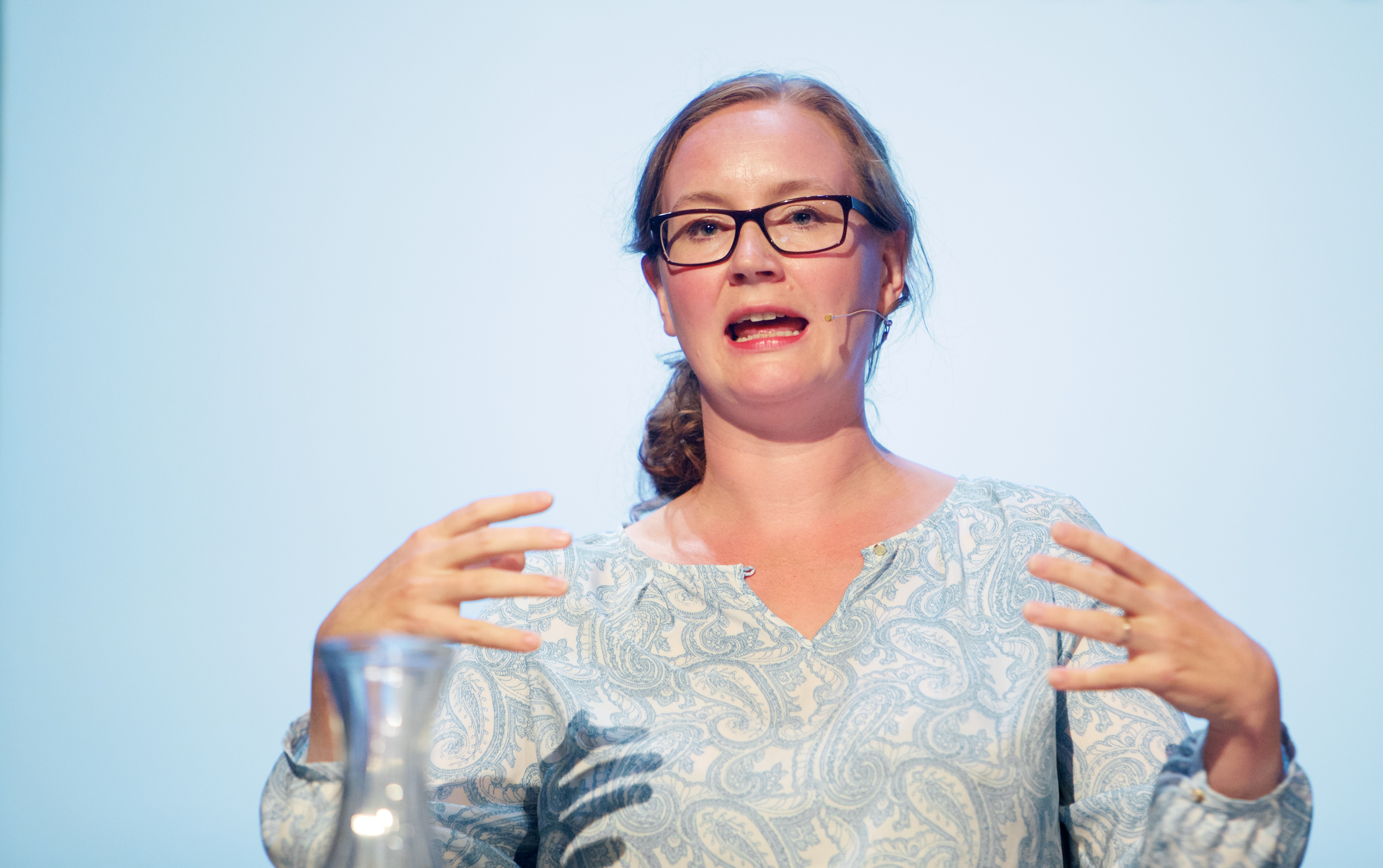 Medieundersøkelsen. Debatt. Kaia Storvik.